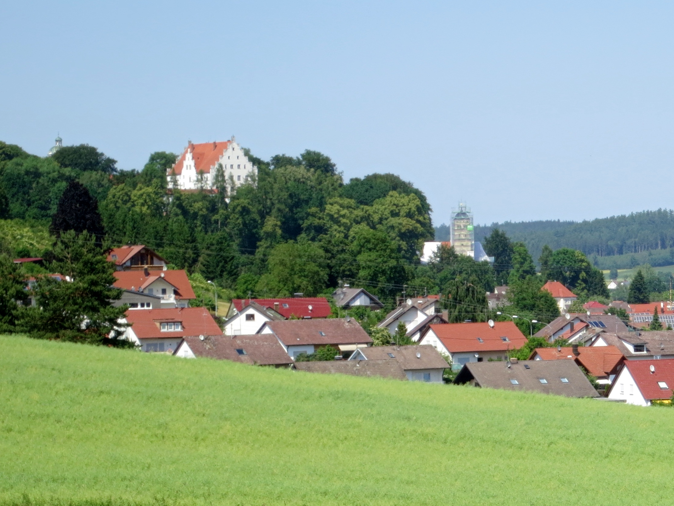 Neuburg von Süden aus gesehen